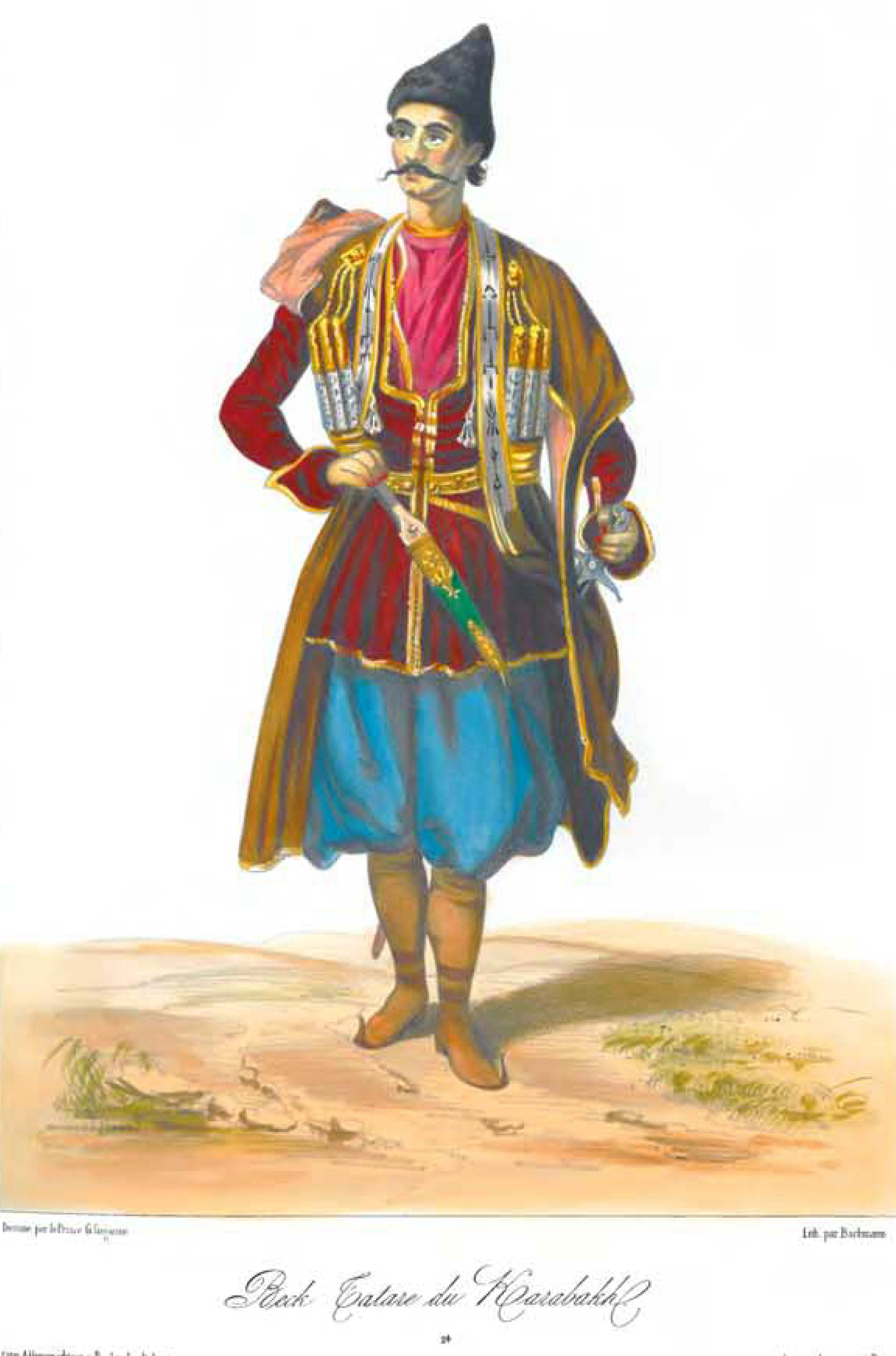 Scènes, paysages, moeurs et costumes du Caucase dessinés d'aprés nature par le prince G. Gagarine.